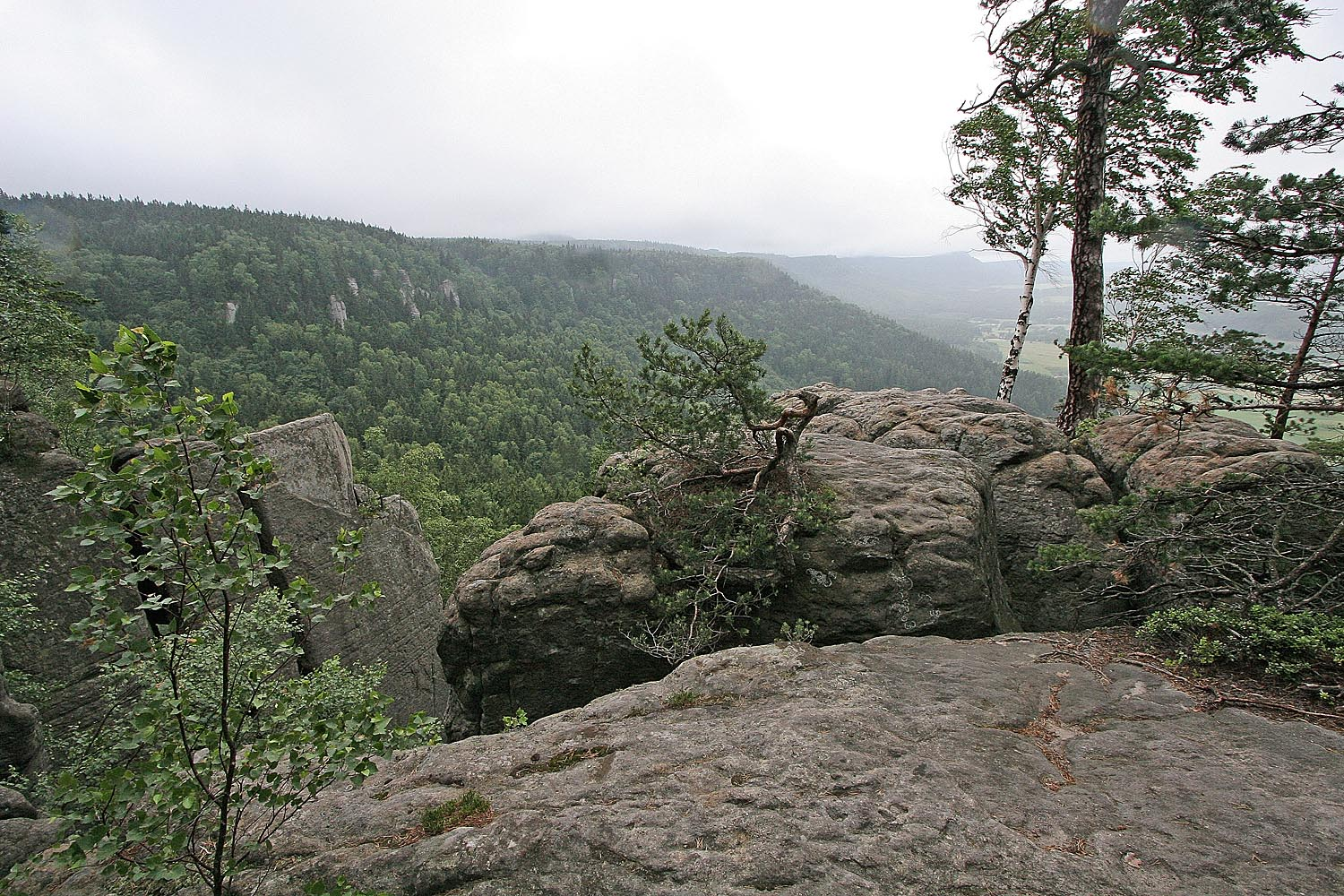 Radkovské skály - pohled z vyhlídky Baszta 663 m